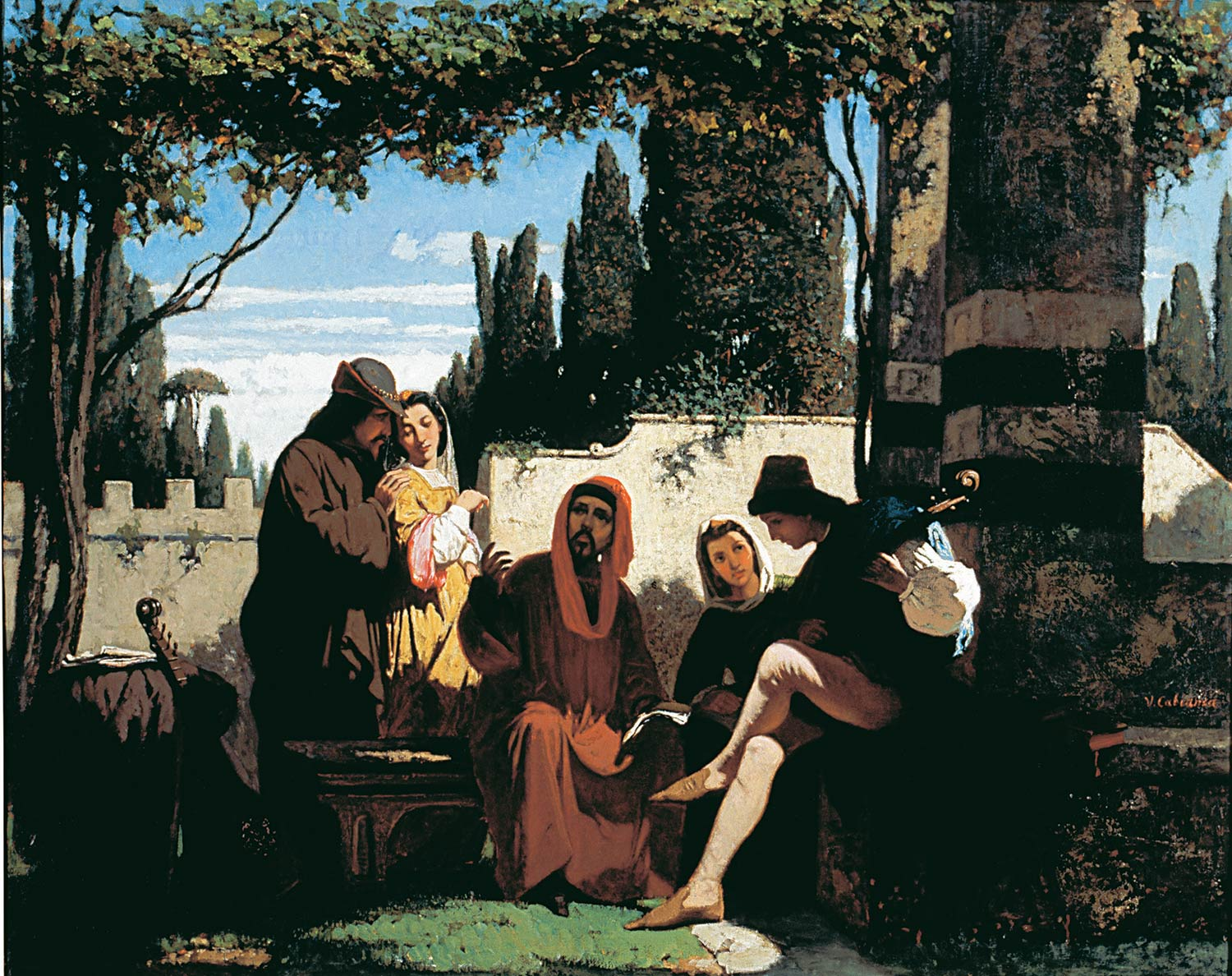 I novellieri fiorentini del XIV secolo